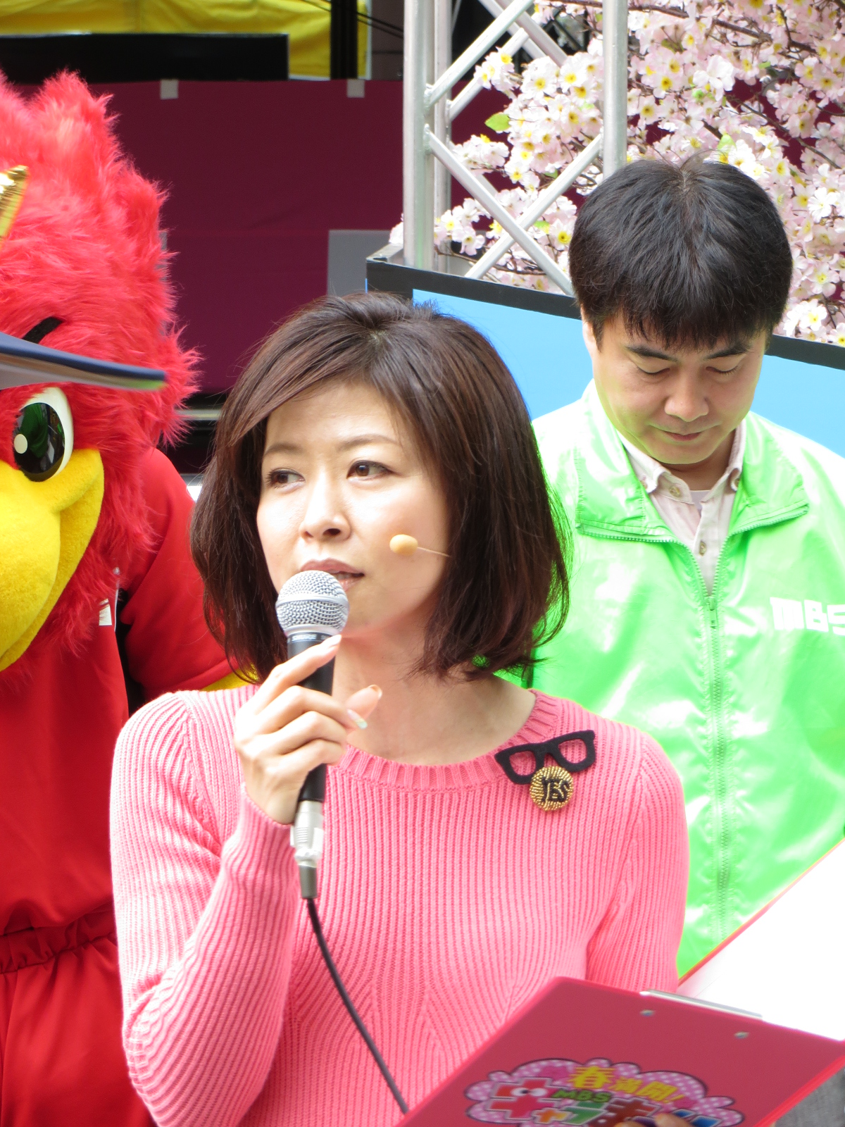 毎日放送アナウンサー松井愛。